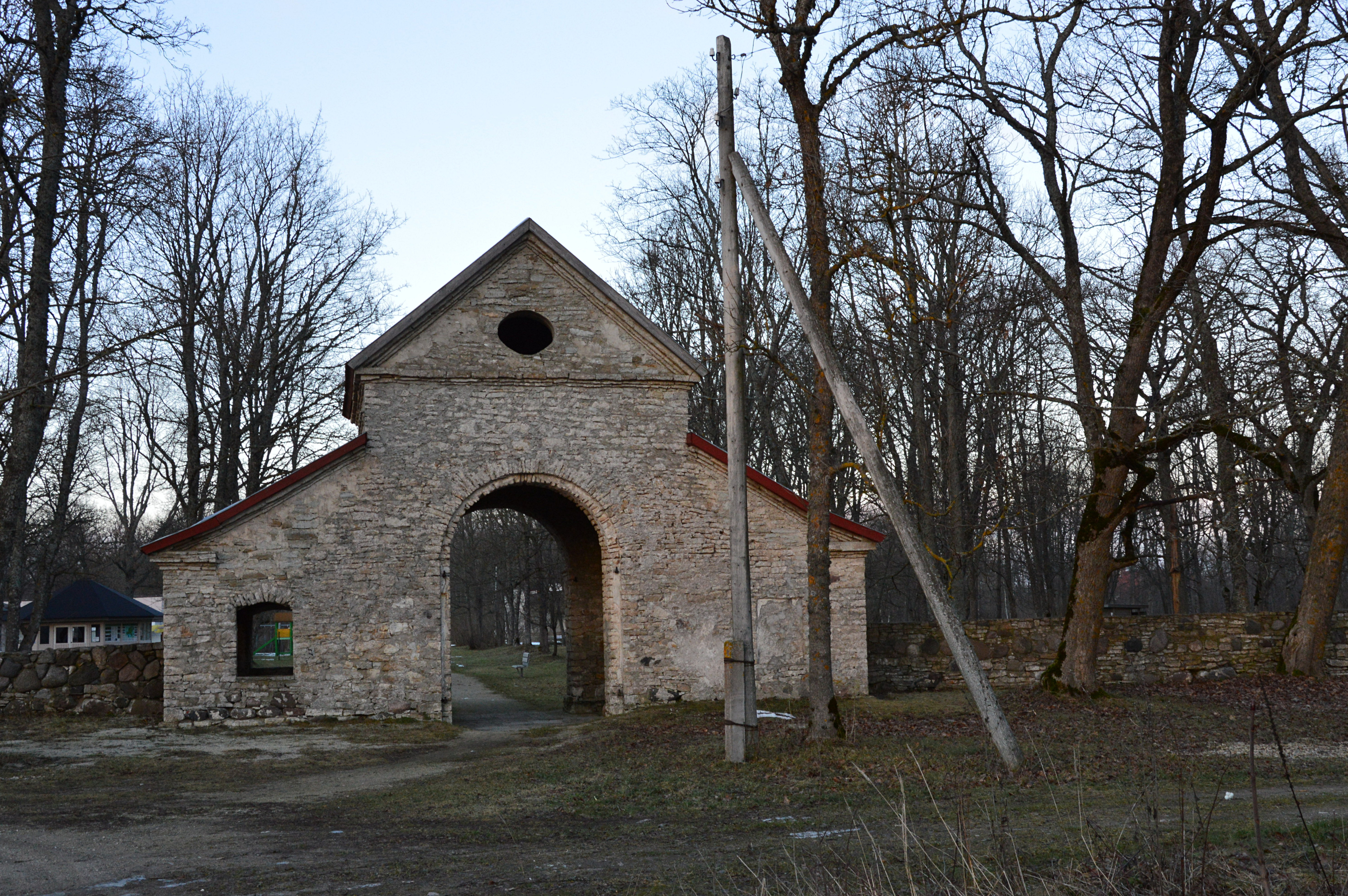 Virtsu mõisapargi väravaehitis